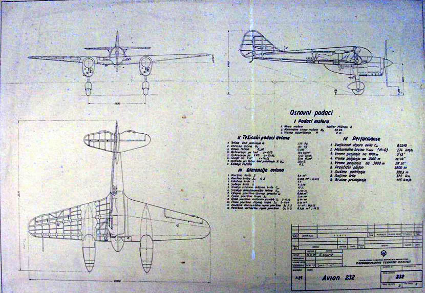 Ikarus 232 Pionir (skica)